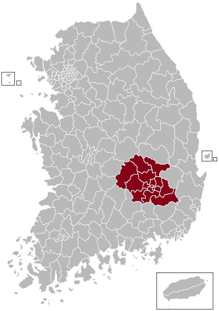 대구우편집중국 관할구역 지도